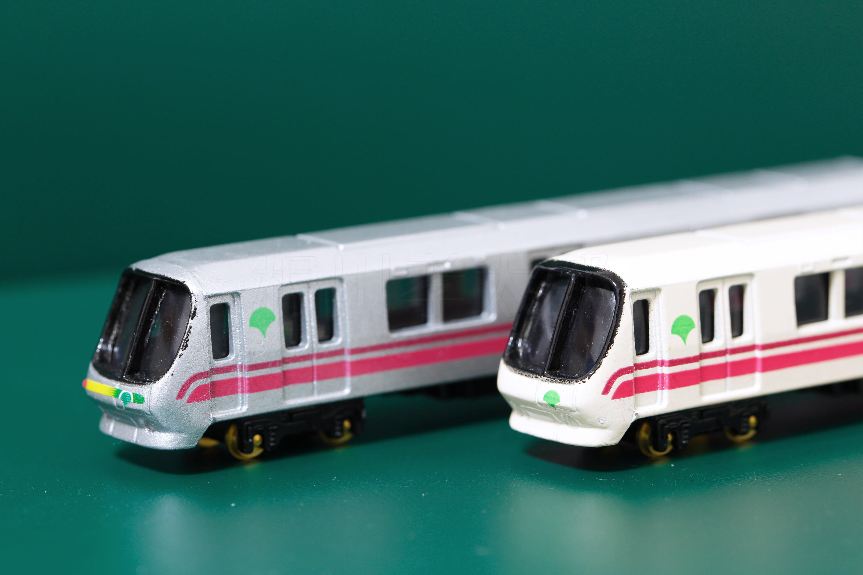 ダイカスケールのja:都営地下鉄12-000形2色。